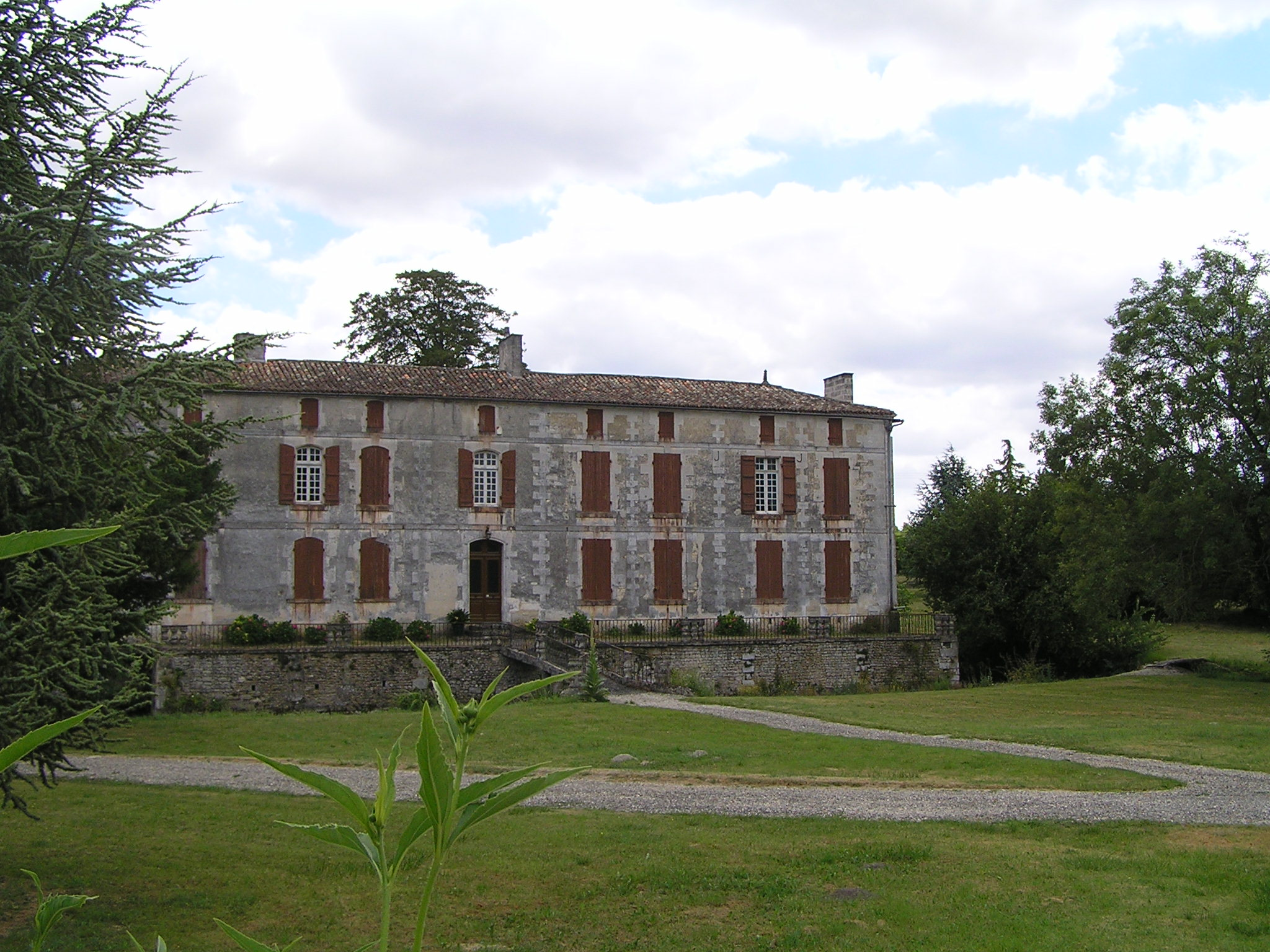 Logis de la Mothe, Criteuil-la-Madeleine